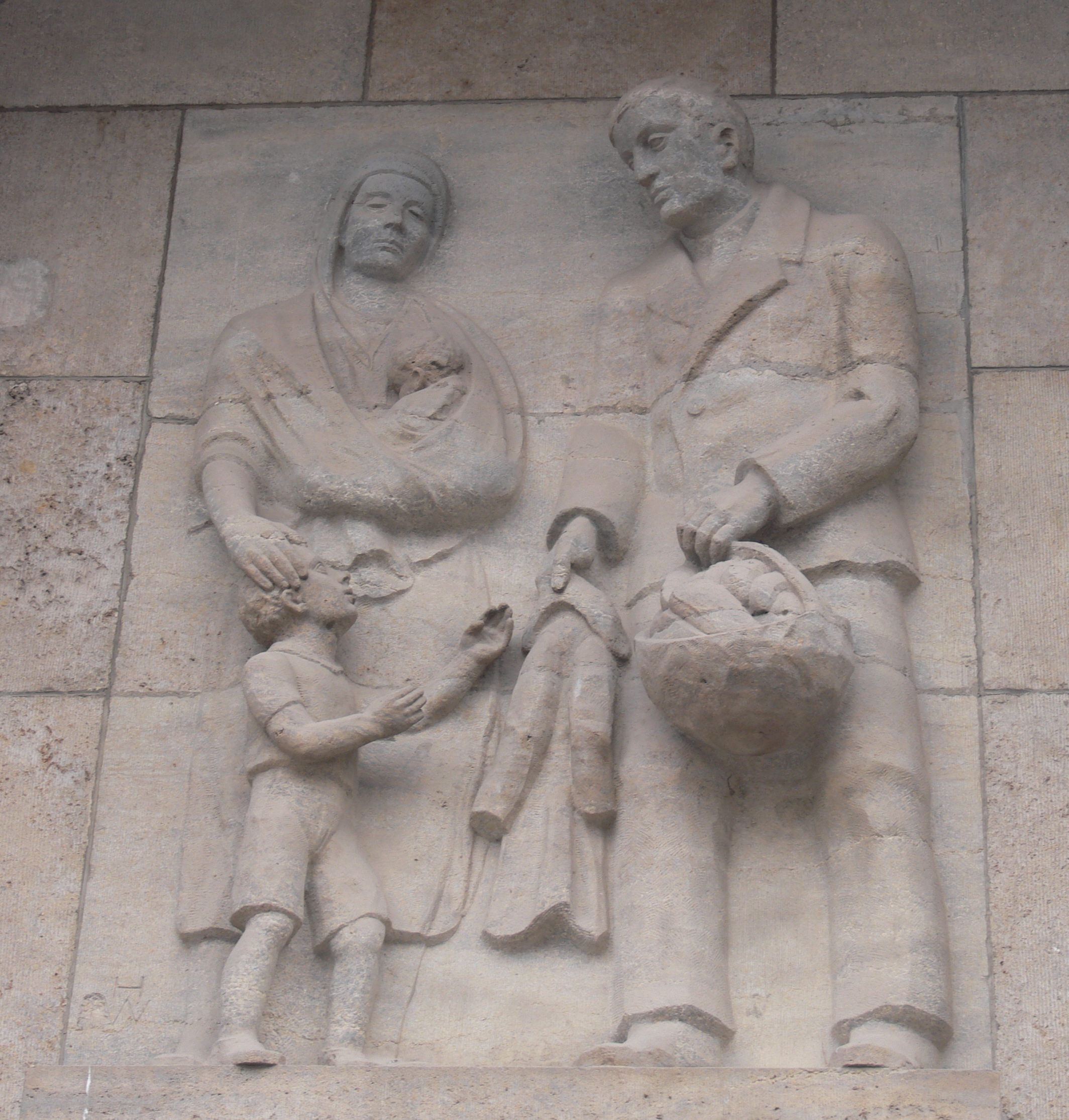 Erfurt, Sparkasse am Fischmarkt (1934/1935) Reliefgestaltung zum Thema "Die Laster und die Tugenden" von Hans Walther